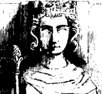 Gisant de Louis III de France (c.863/65 - 882)